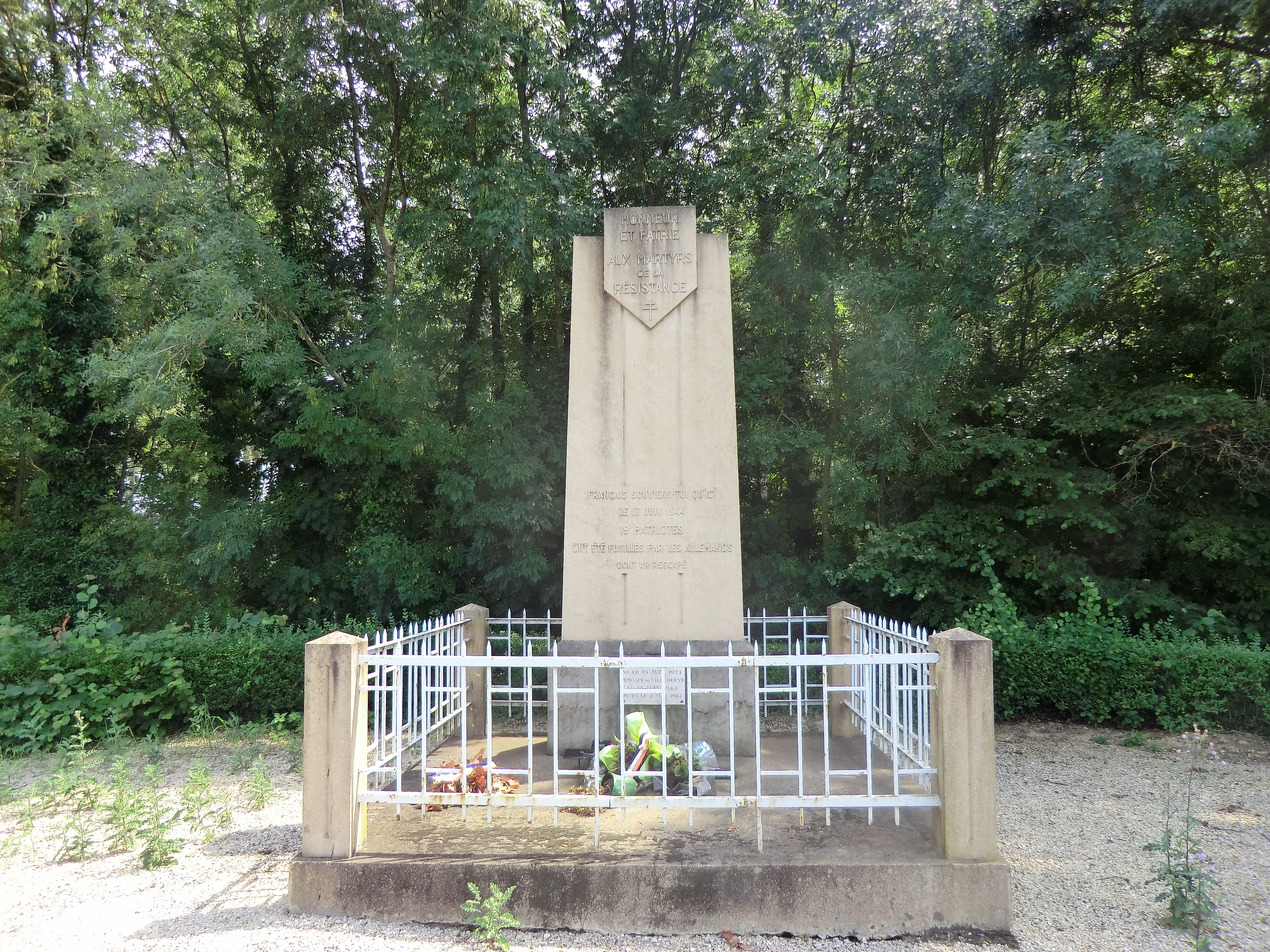 Monument des dix neuf fusillés de Villeneuve (Ain) dont Jean Gouailhardou et René Leynaud. Plusieurs victimes inconnues. Un survivant, Jacques Thoinet.